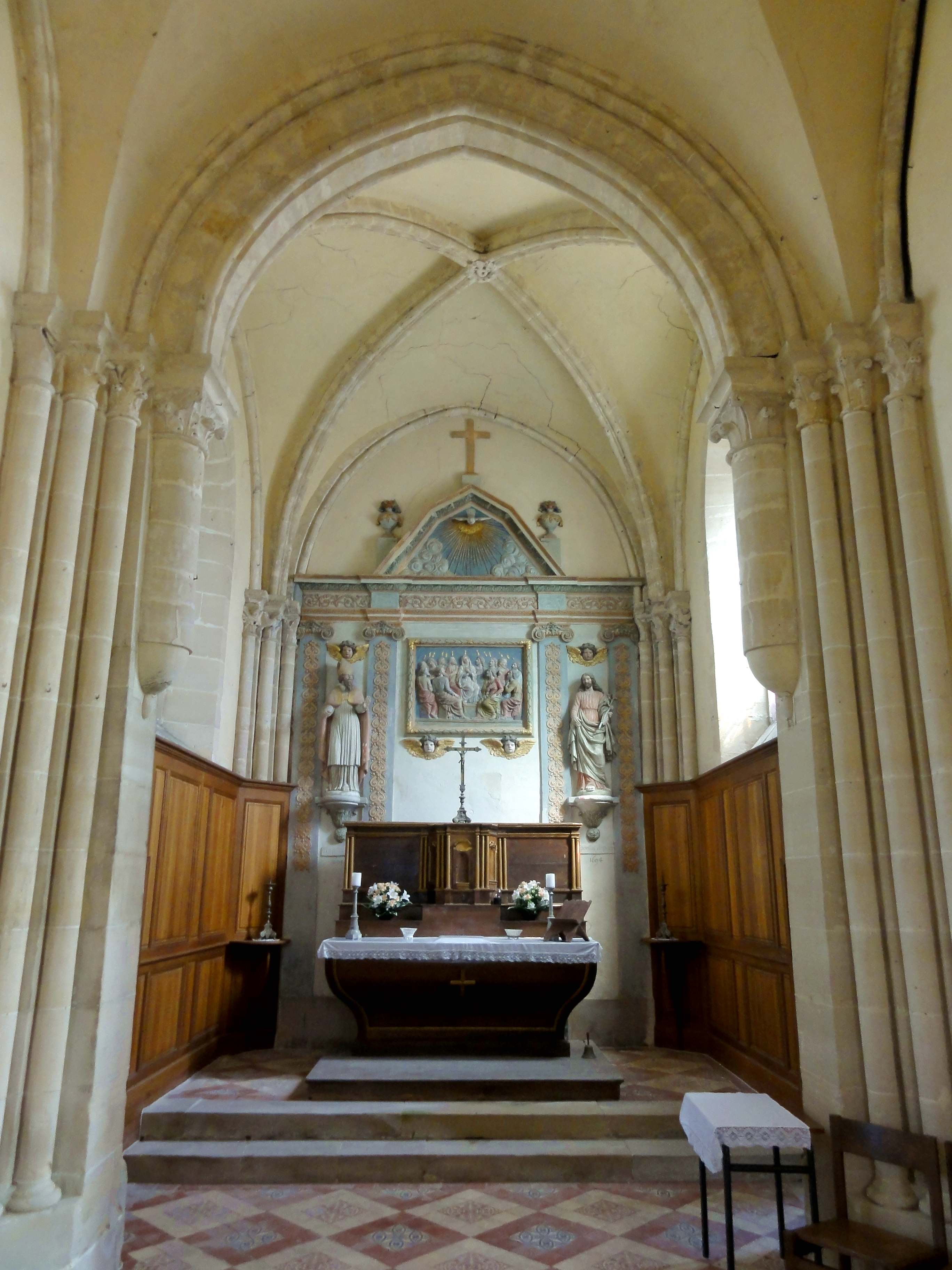 Intérieur de l'église (voir titre).